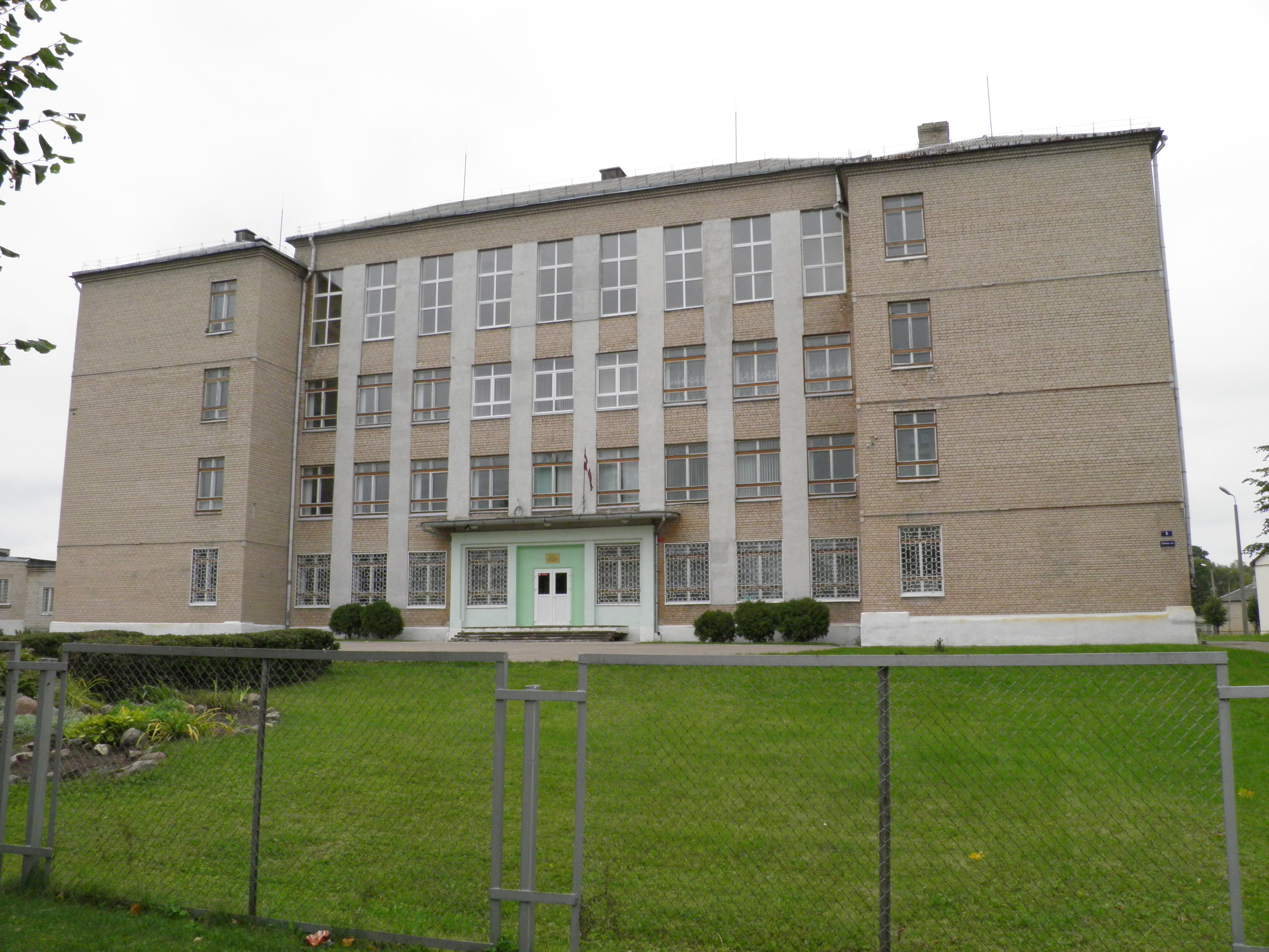 Ilūkstes Sadraudzības vidusskola.